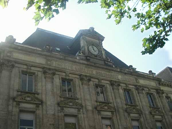 Bourse du travail.